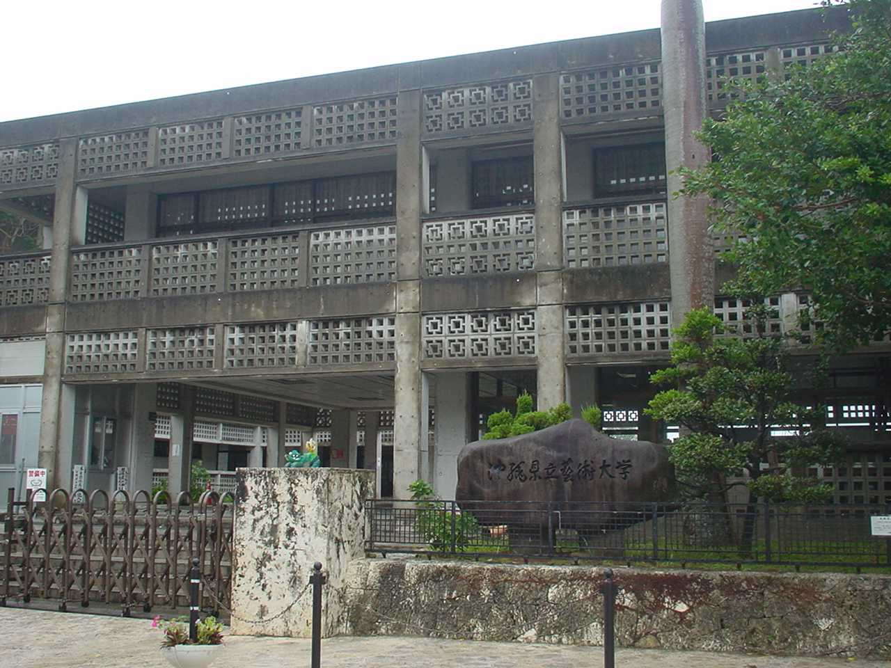 沖縄芸術大学（2005年11月13日投稿者が撮影）